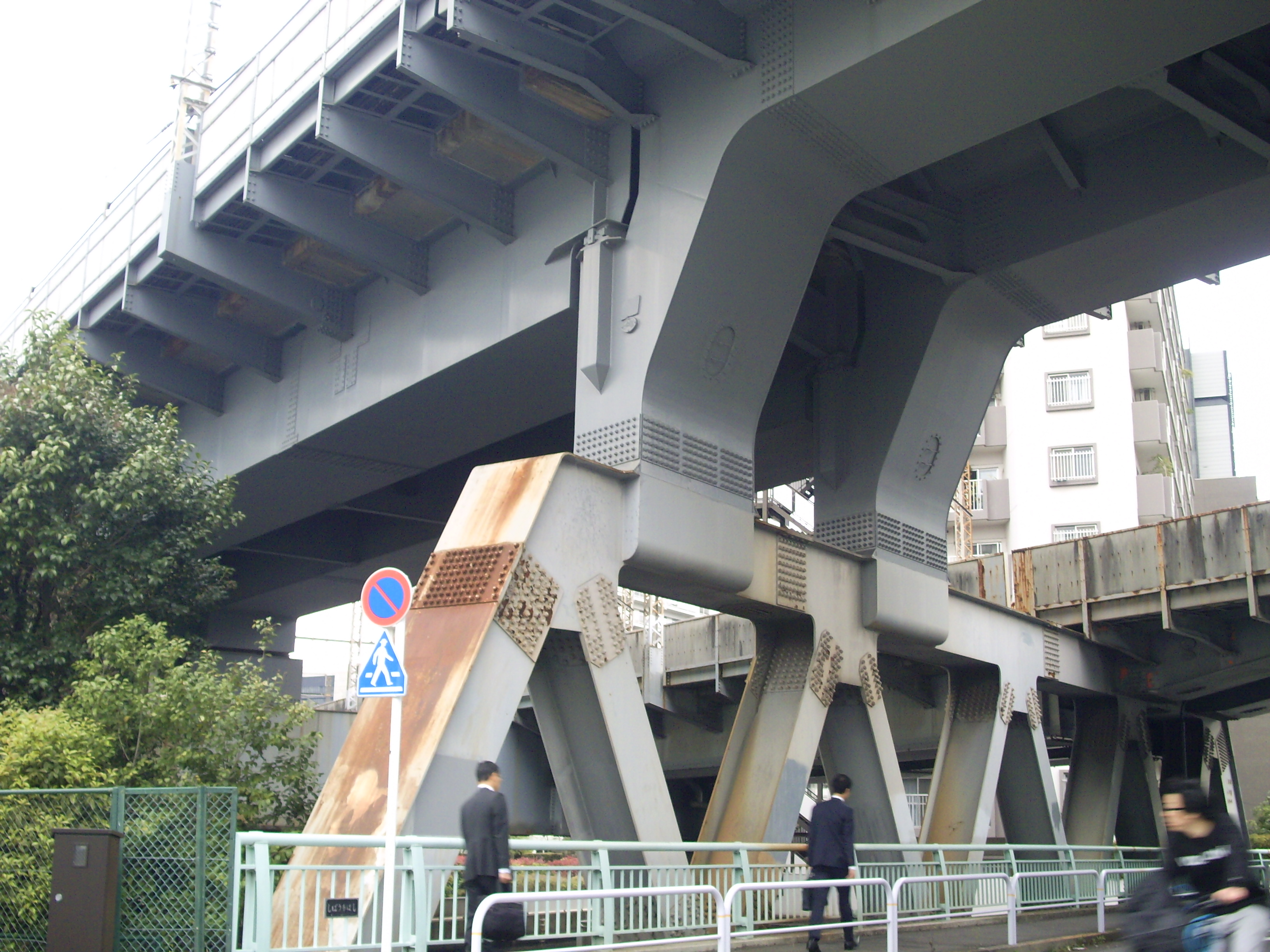 東海道新幹線大井車両基地引き込み線：新芝運河跨橋二段式橋脚 ㊟カメラを起動すると日付機能が出荷時のものに初期化されるため、ファイル履歴の撮影日時とメタデータの原画像データの生成日時が異なります